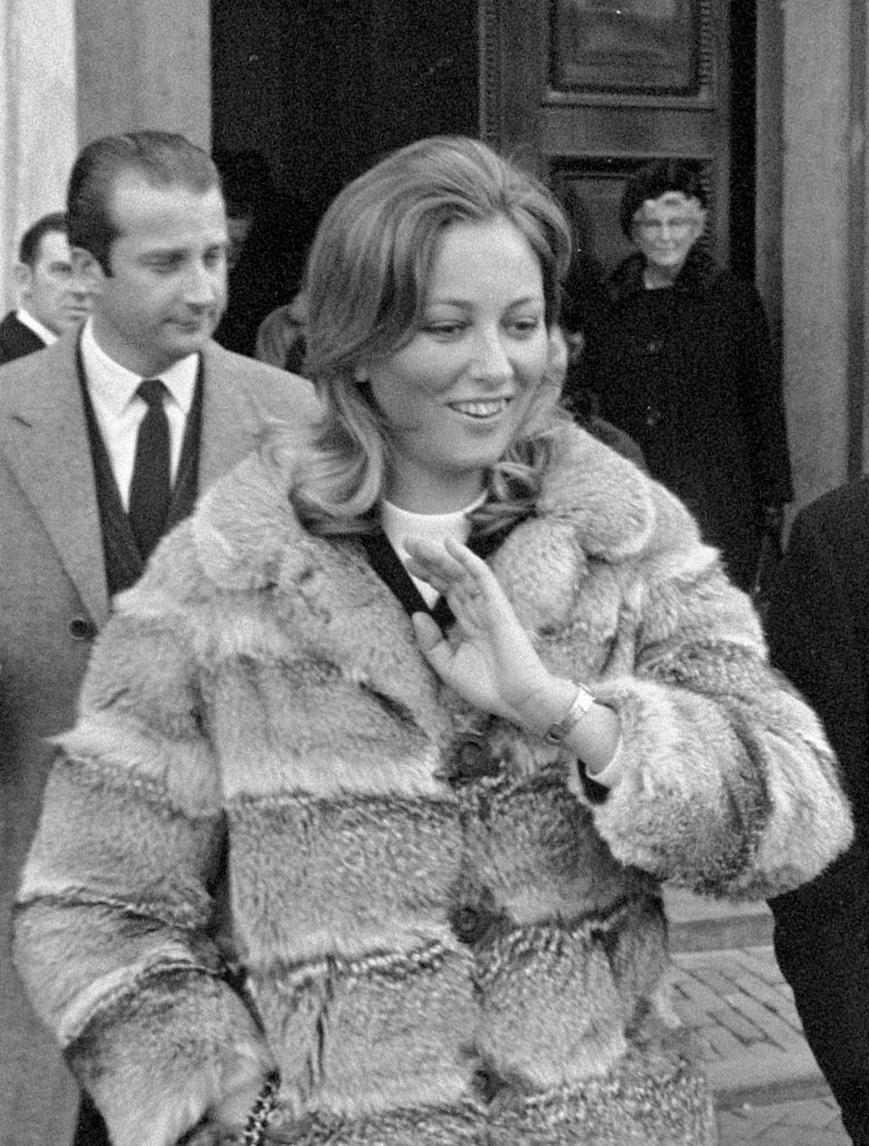 Prinses Paola en Prins Albert van Belgie in Amsterdam Prins Albert , Prinses Paola en burgemeester Samkalden verlaten ambtswoning